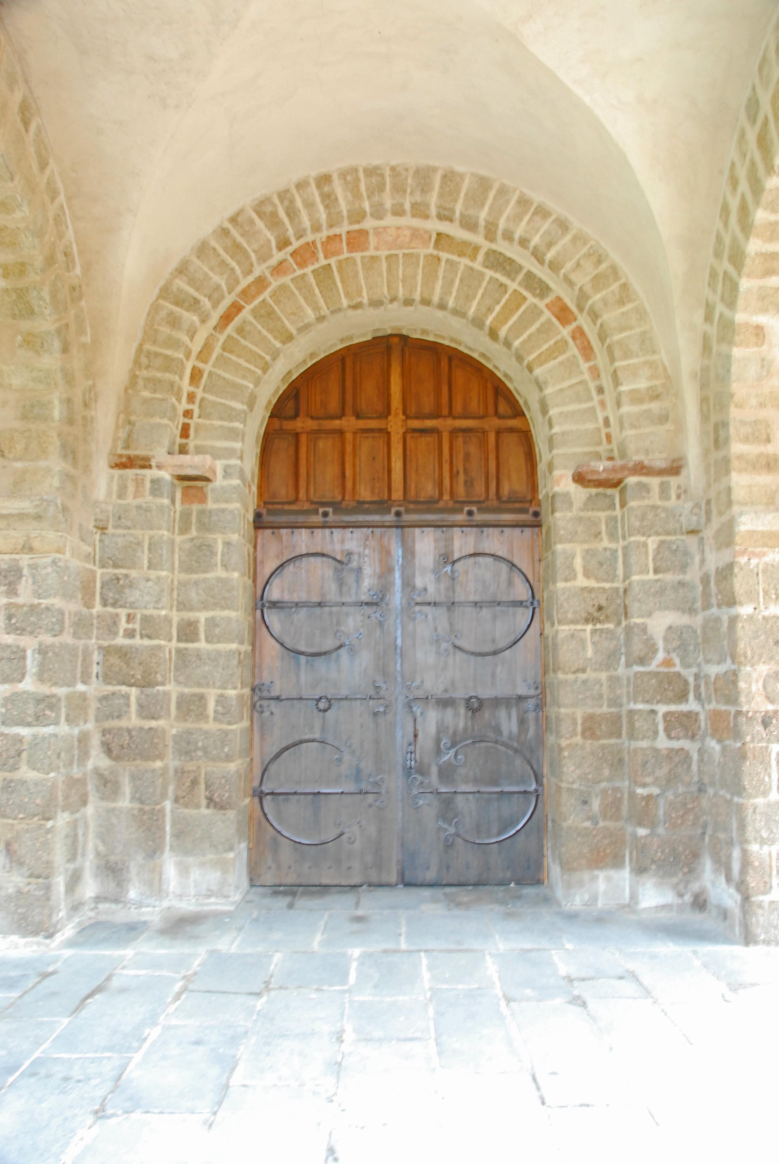 N.-D. de Châtel-Montagne, Hauptportal